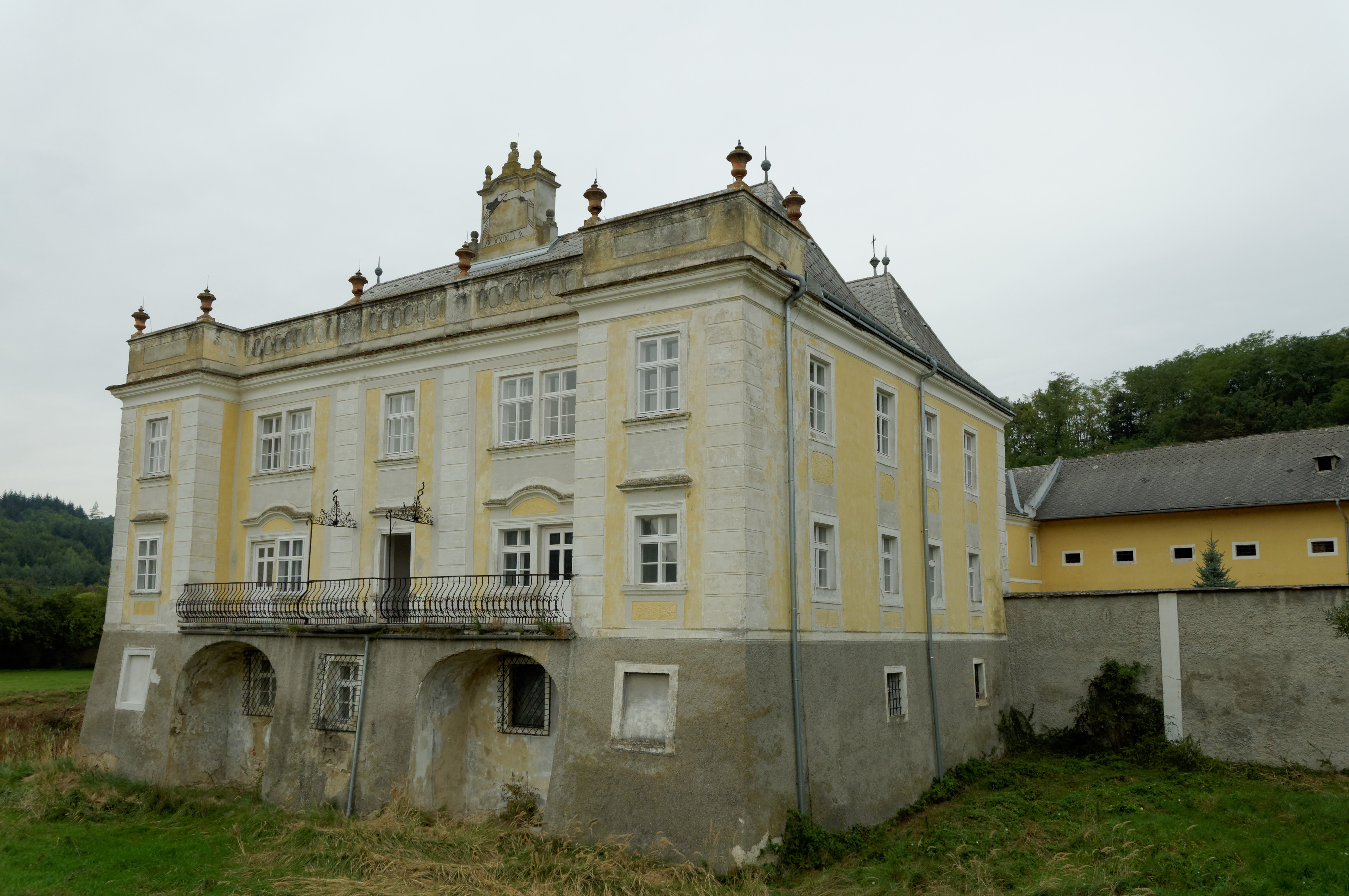 Schloss Meidling (ehemals Strafanstalt) Dieses Bild wurde anlässlich des österreichischen Tags des Denkmals 2013 in Niederösterreich eingereicht.